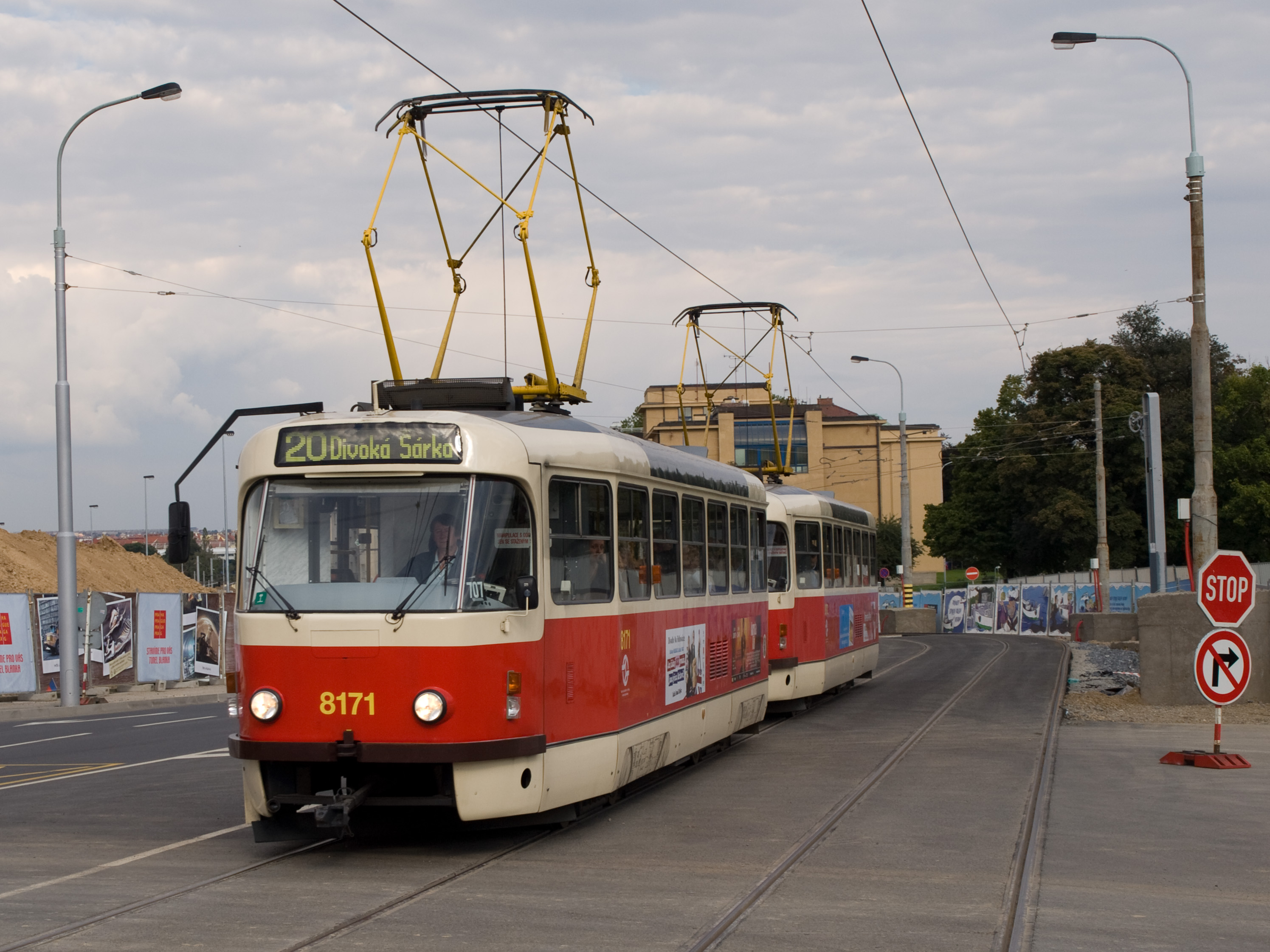 Tatra T3R.PV, Hradčanská – Vítězné náměstí, Praha